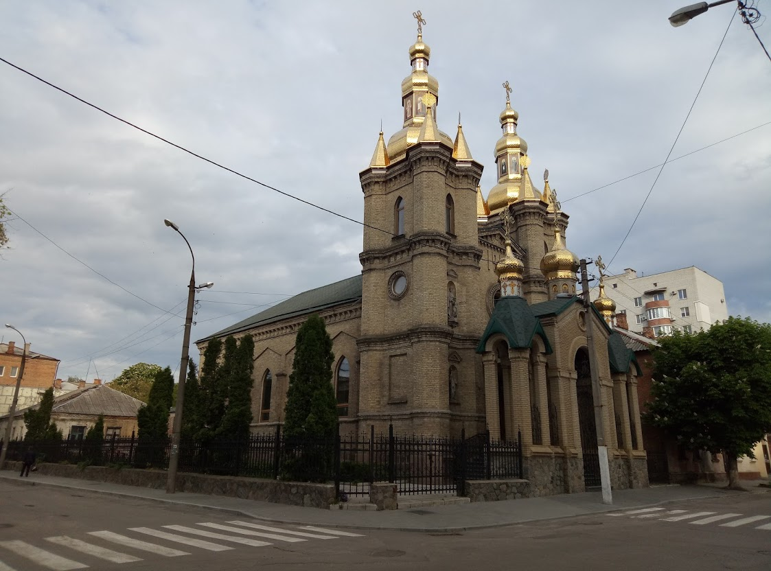 Собор святого Миколая Чудотворця у Кременчуці